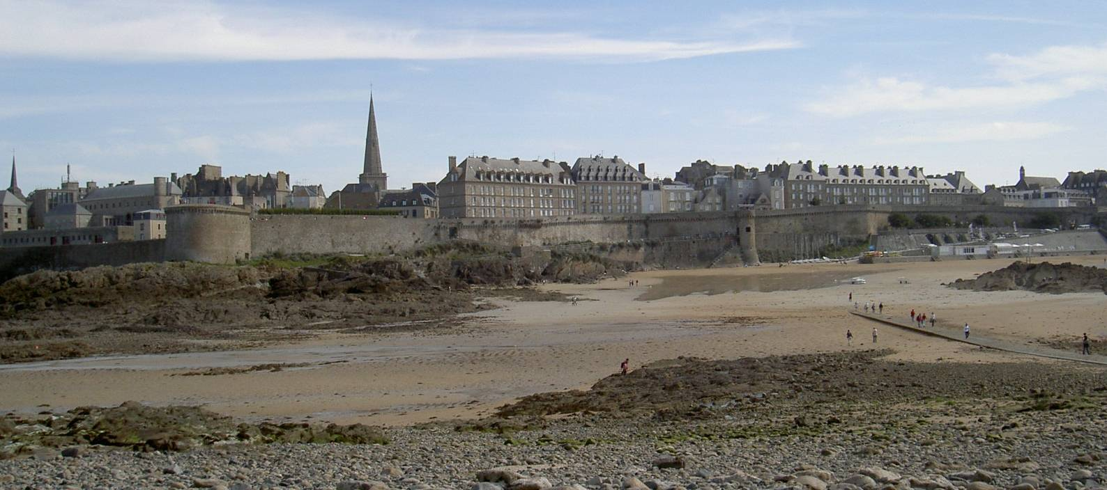 Sicht auf Saint-Malo bei Ebbe; links das (bei Ebbe mit dem Festland verbundene) Fort National, rechts der Weg zu den Inseln Grand Bé und Petit Bé